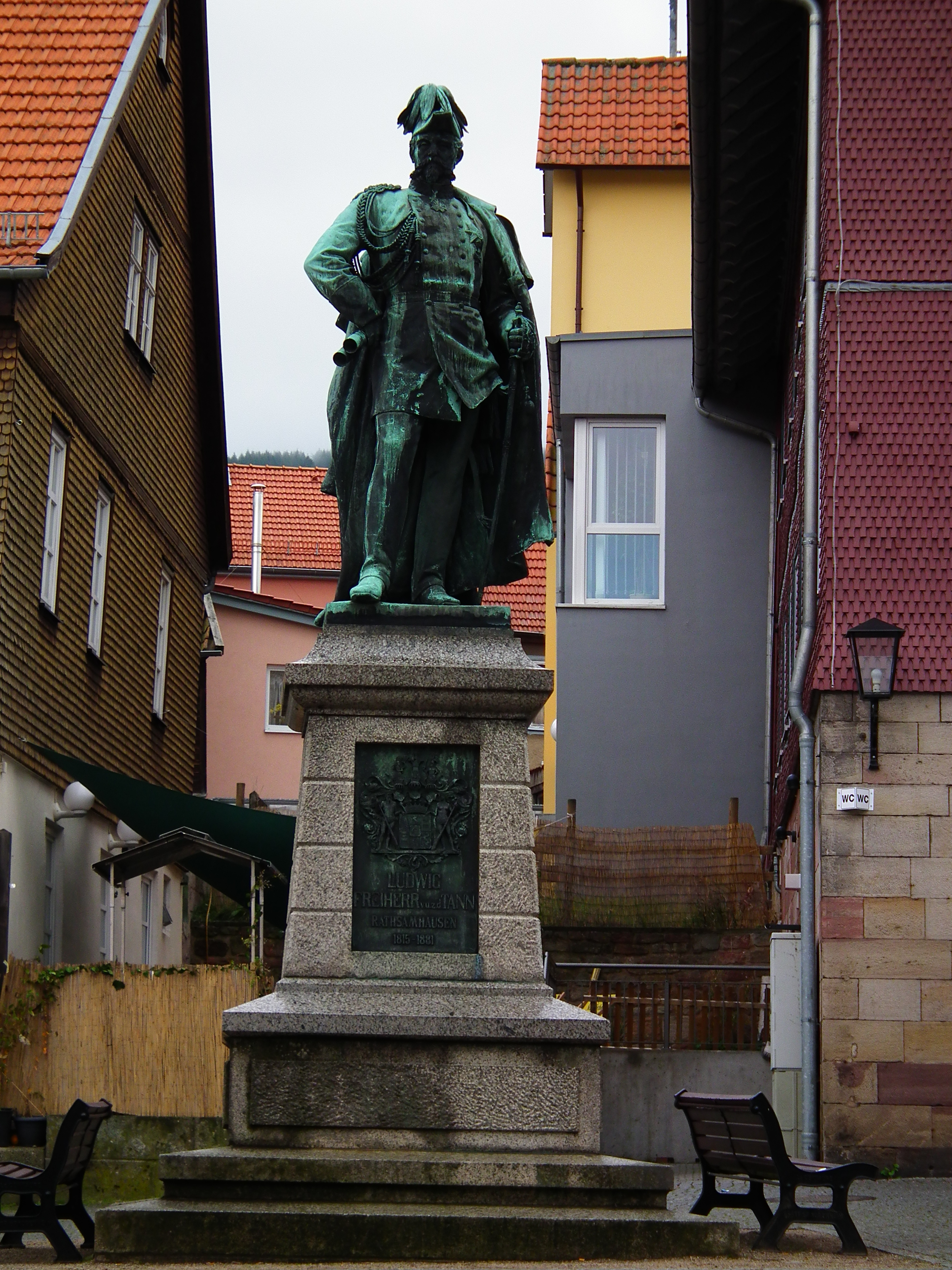 Statue von Ludwig von der Tann-Rathsamhausen in Tann (Rhön, Hessen, Deutschland)